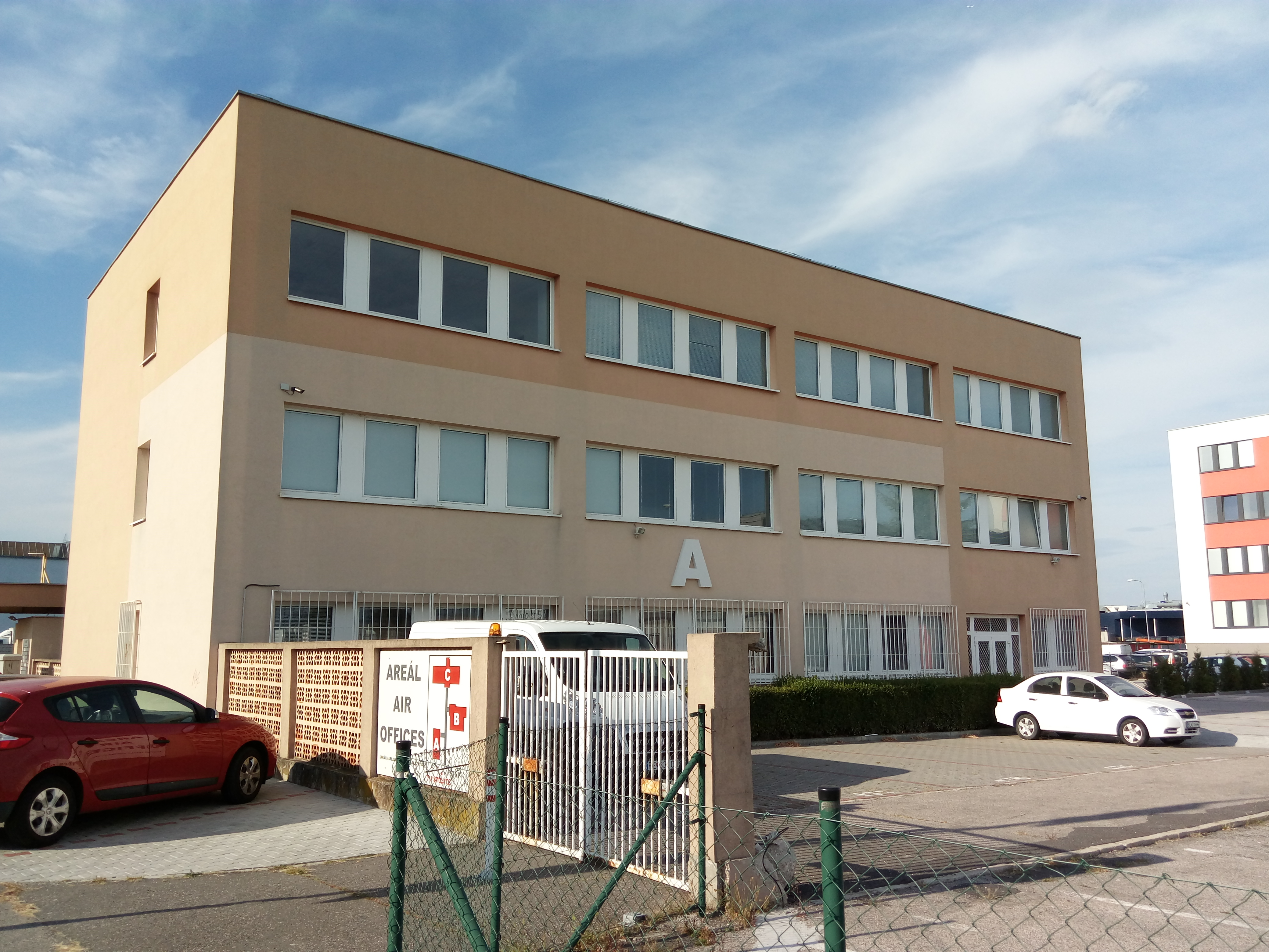 Pestovateľská 2, Ružinov, Bratislava